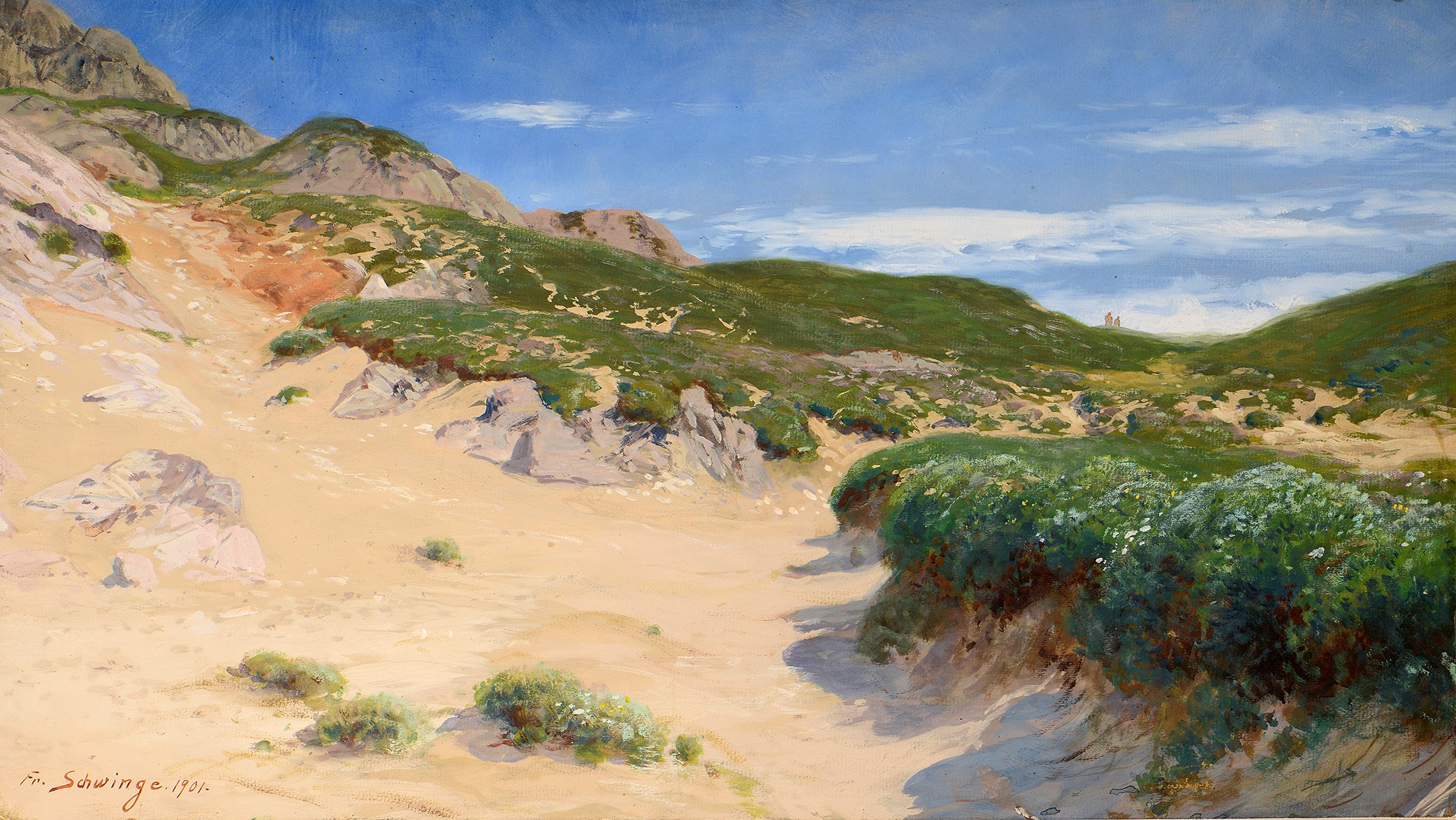 Friedrich Schwinge: Landschaft mit Dünen, 1901, Gouache, 69,7 × 37,6 cm